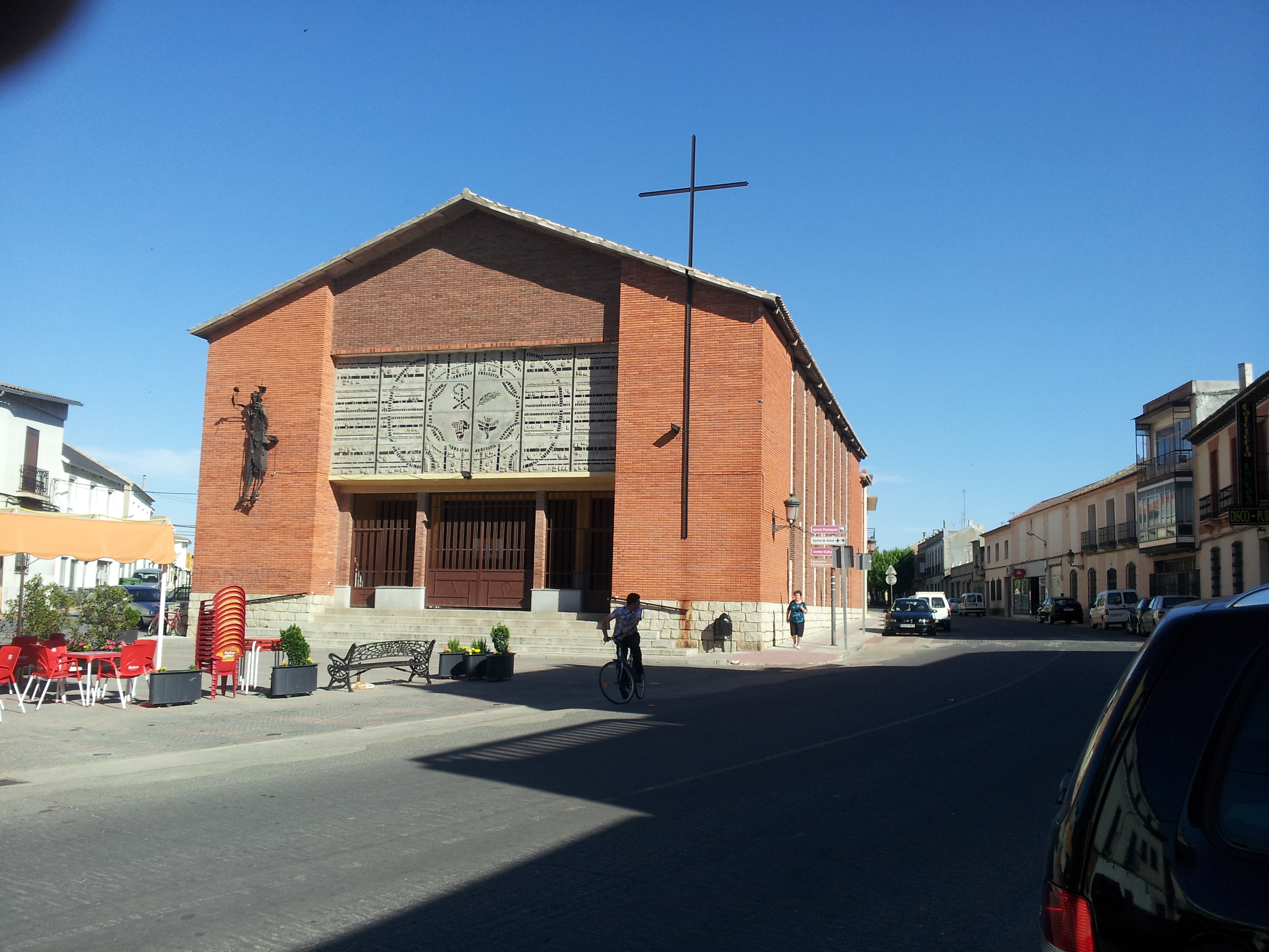 Iglesia de Nuestra señora de la Paz en Villarta de San Juan